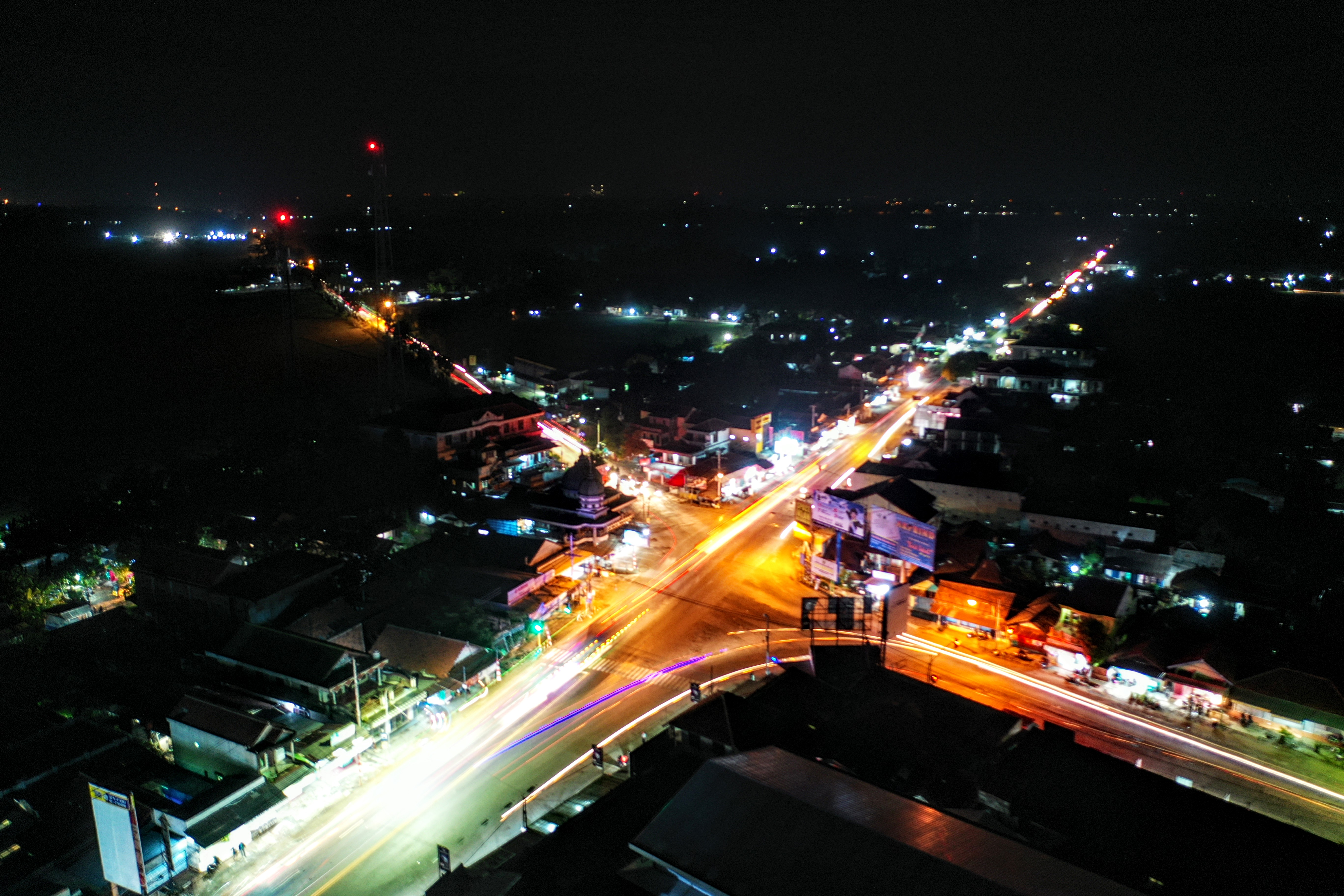 Perempatan Buntu dilihat dari udara saat malam hari